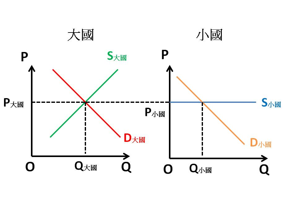 總體經濟對於開放式經濟大國與小國的貿易解釋圖